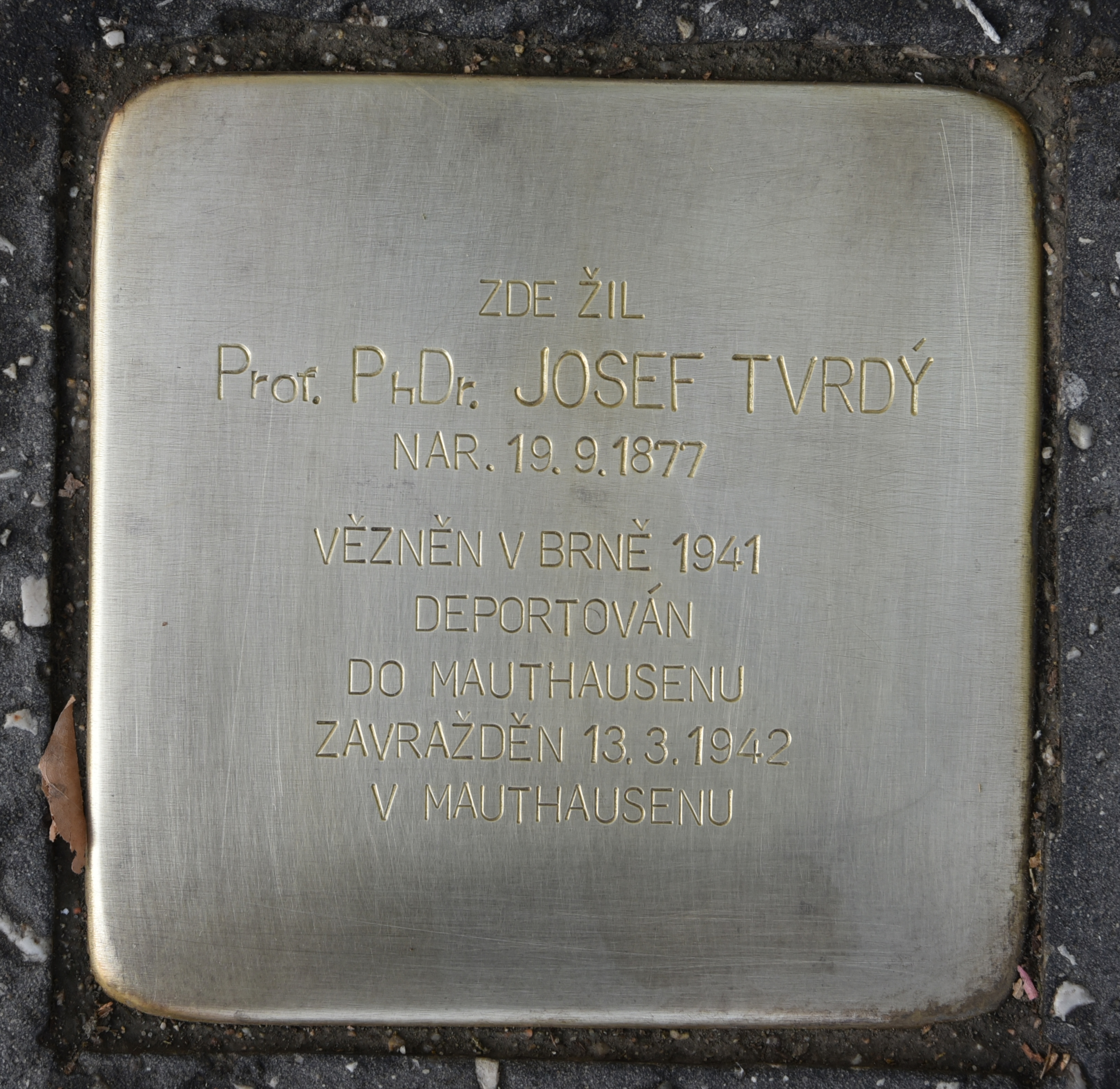 Gedenkstein für Josef Tvrdy